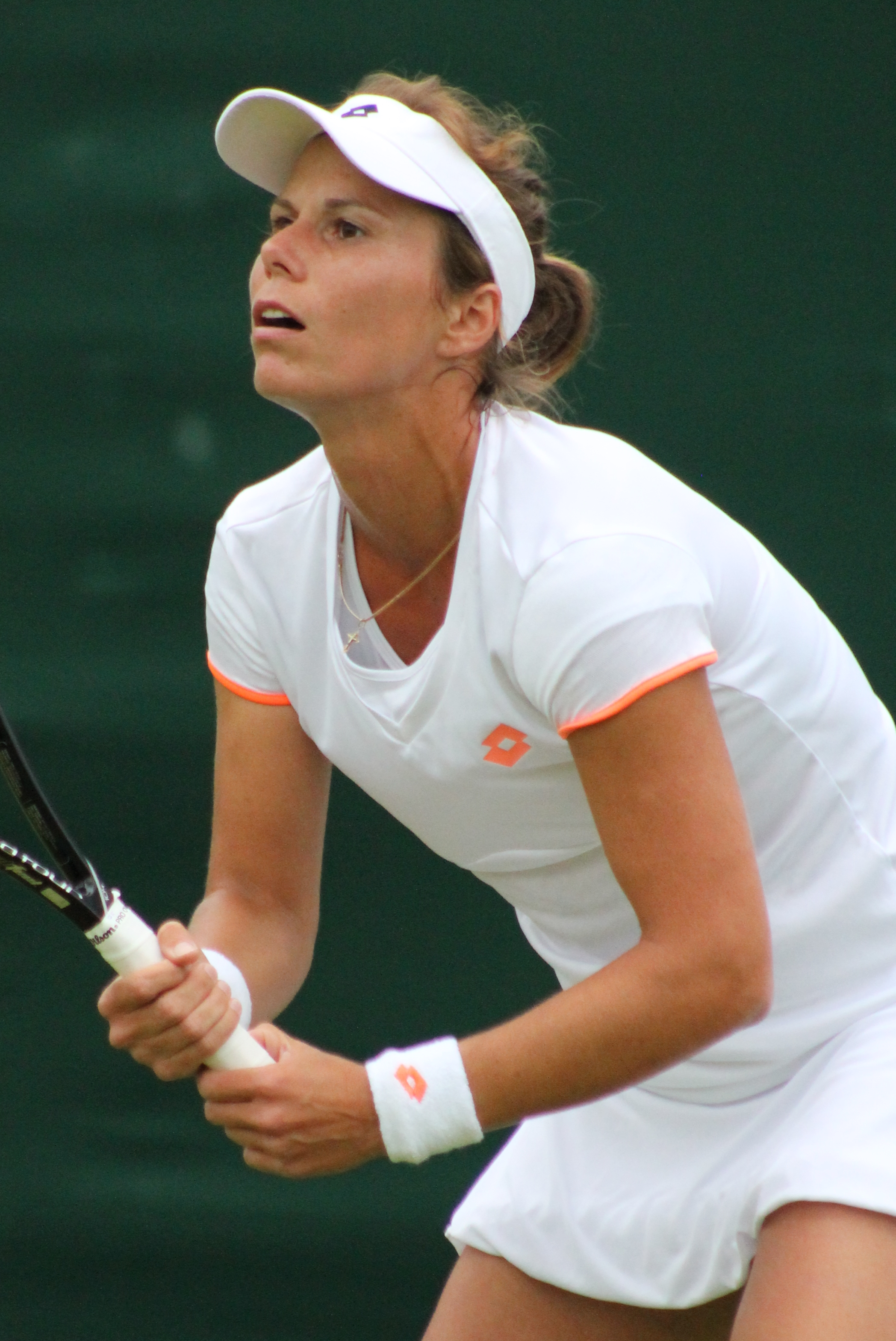 Lepchenko WM14 (5)